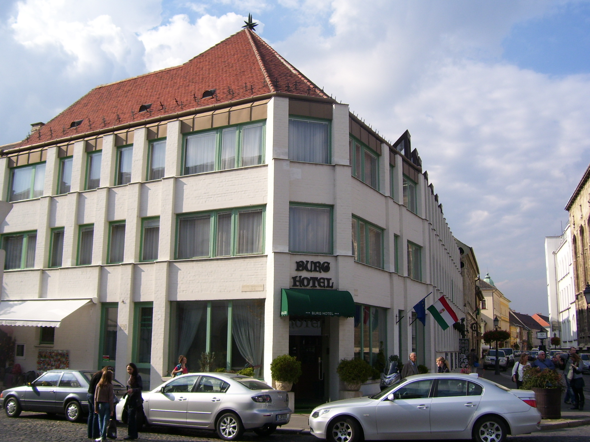 Budapest, I. Szentháromság tér 7-8 Ma: Hotel Burg